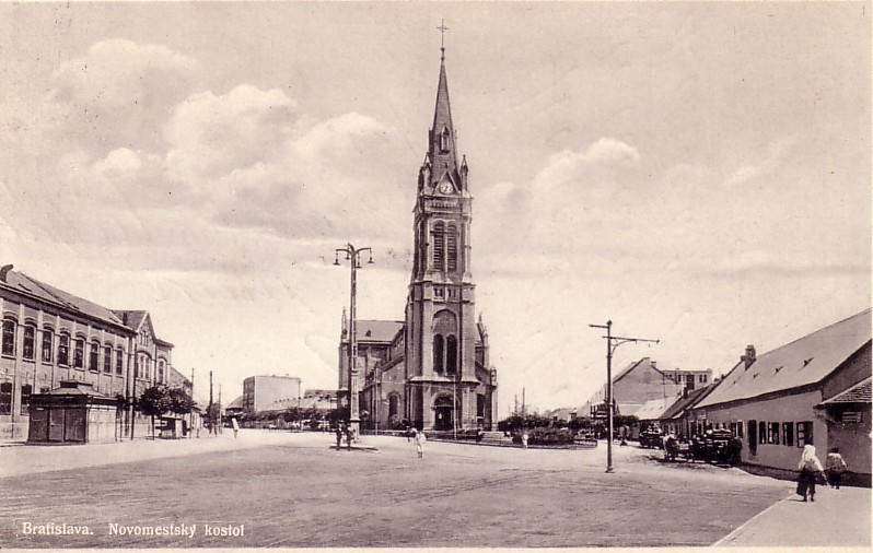 In der Mitte des Platzes ist die dritte Blumenthaler Kirche zu sehen, links im Bild ein Teil der ehemaligen Bürstenfabrik Grüneberg. Rechts die ursprüngliche Bebauung des Platzes.